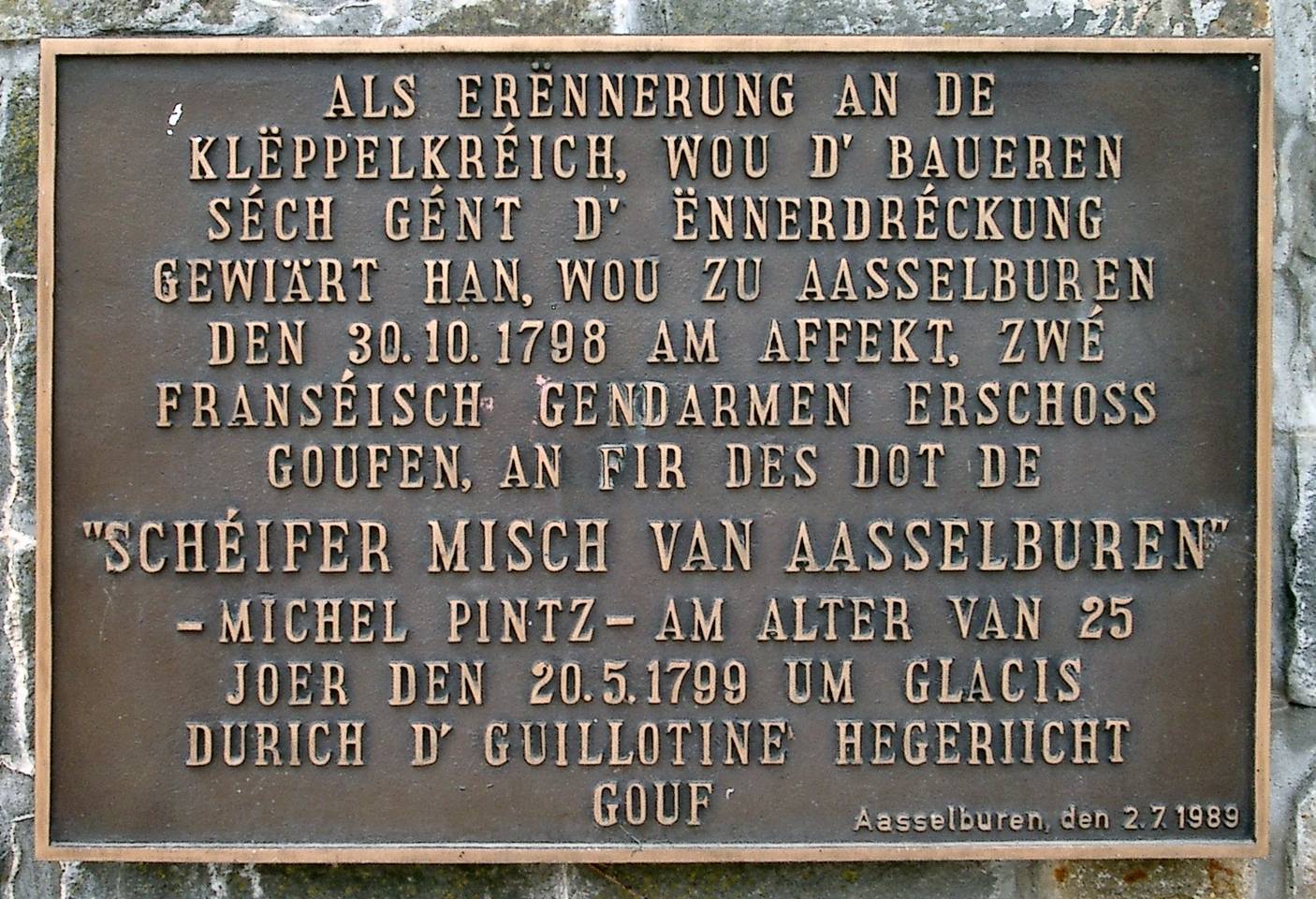 Sujet: Gedenkplack fir de Schéifermisch vun Aasselbuer; Auteur: selwer geknipst vum Pecalux; Plaz